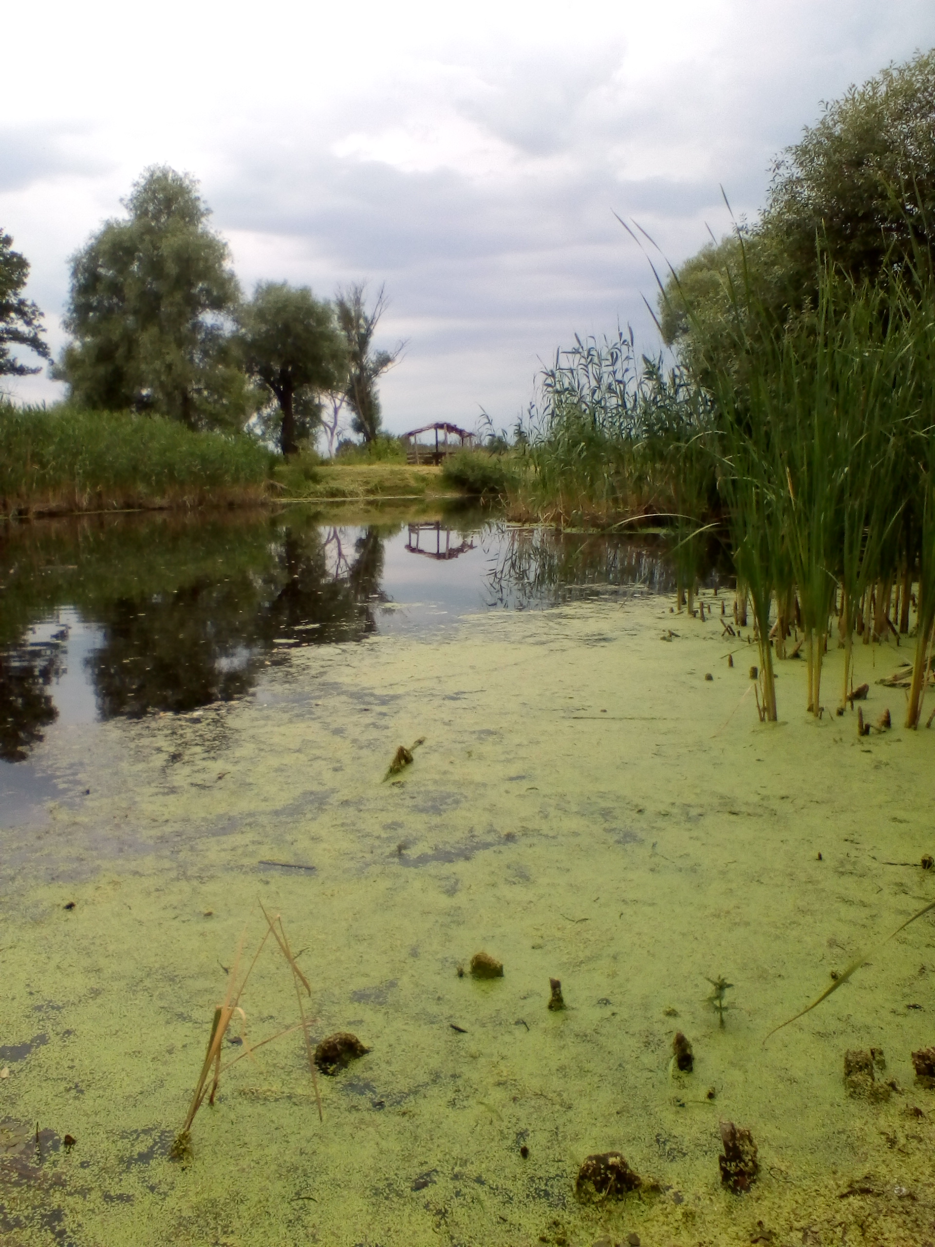 Поблизу с. Пiски р. Сула